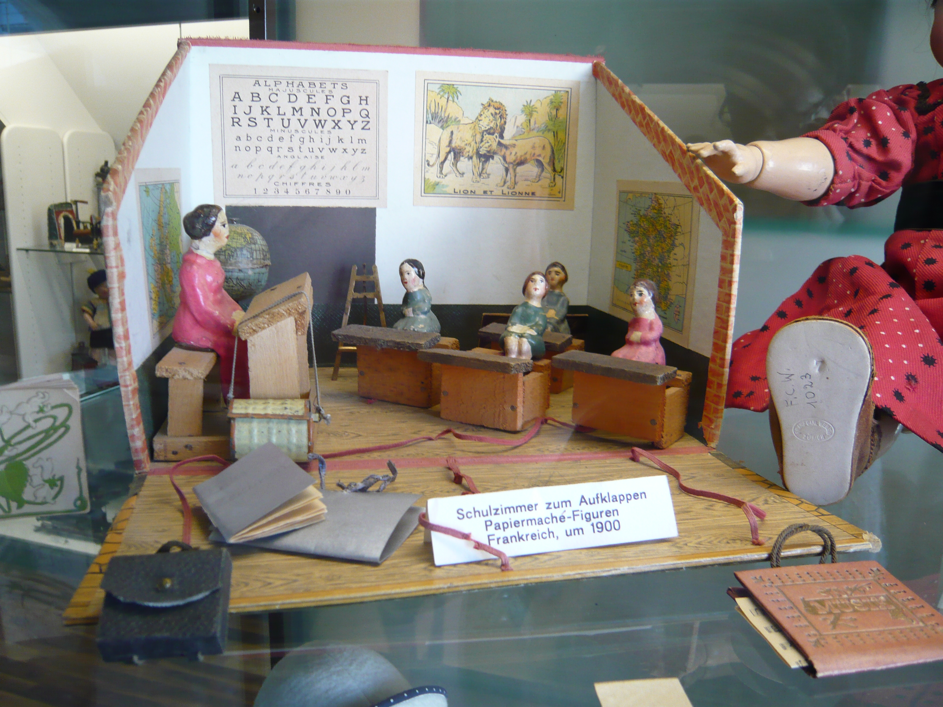 Schulzimmer aus Frankreich zum Aufklappen mit Papiermaché-Figuren (ca. 1900) aufgenommen im Zürcher Spielzeugmuseum Native nameZürcher SpielzeugmuseumLocationZürich, SwitzerlandCoordinates47° 22′ 23″ N, 8° 32′ 23″ E Established1956WebsiteZürcher SpielzeugmuseumAuthority control : Q248517